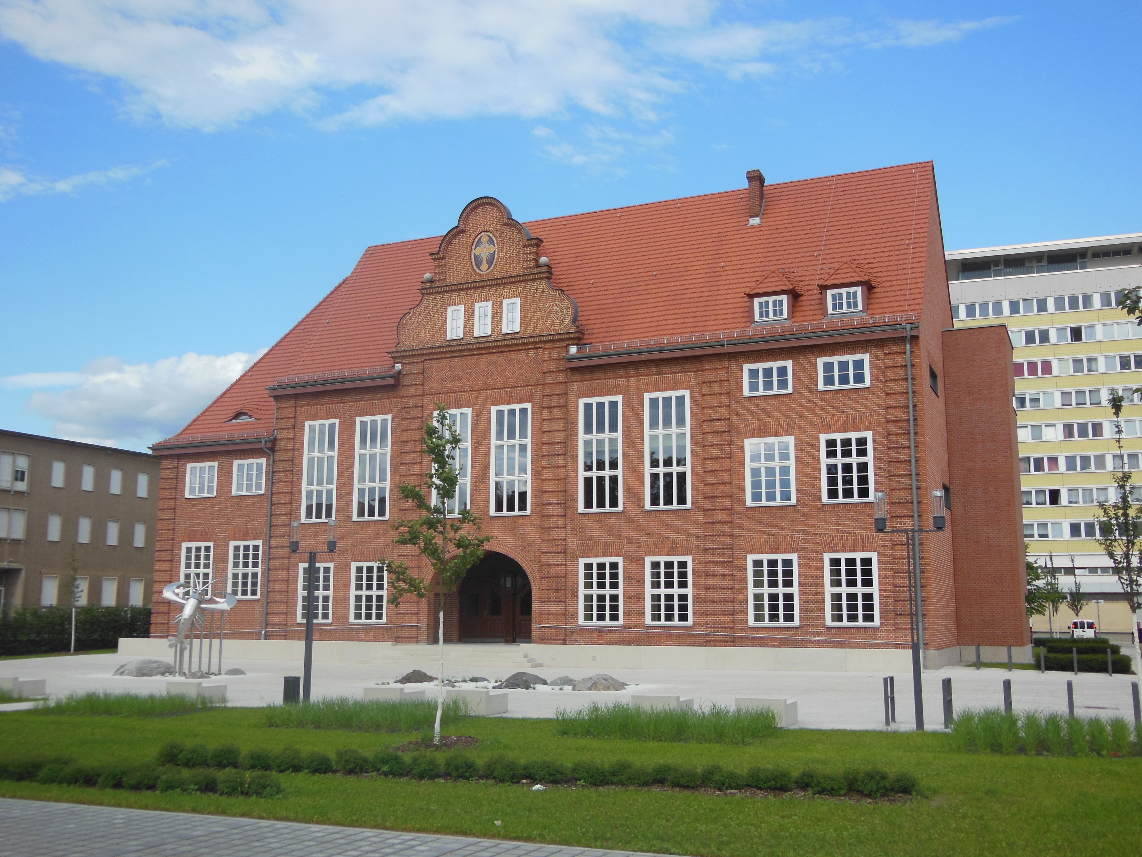 Vorderseite des Stadthaus in Cottbus